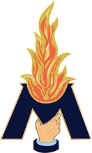 La Flama Ardiente es el símbolo del Sodalitium Christianae Vitae